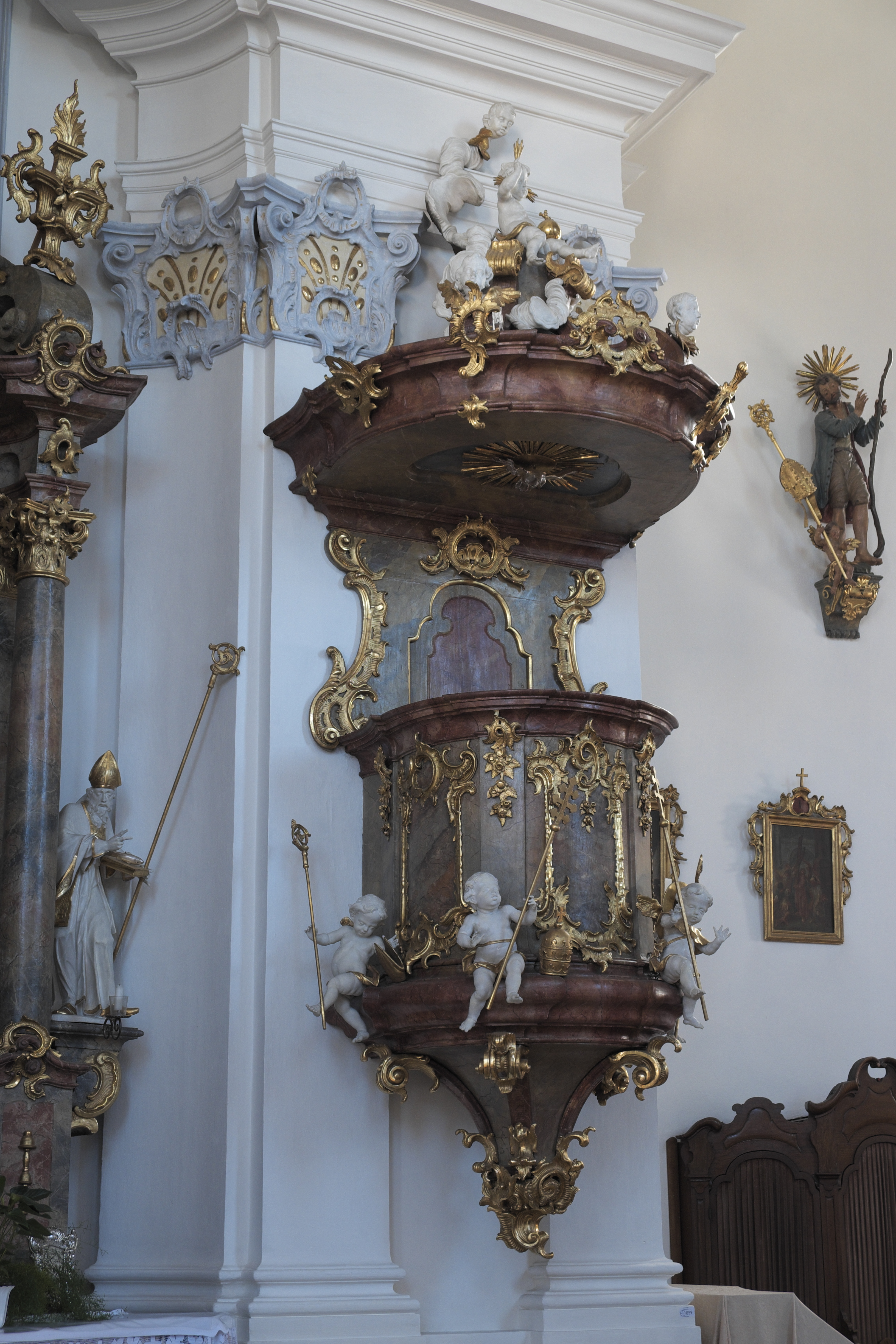 Katholische Pfarrkirche St. Johannes Baptist in Inning am Ammersee im Landkreis Starnberg (Bayern/Deutschland), Rokoko-Kanzel von Franz Joseph Pfeiffenhofer